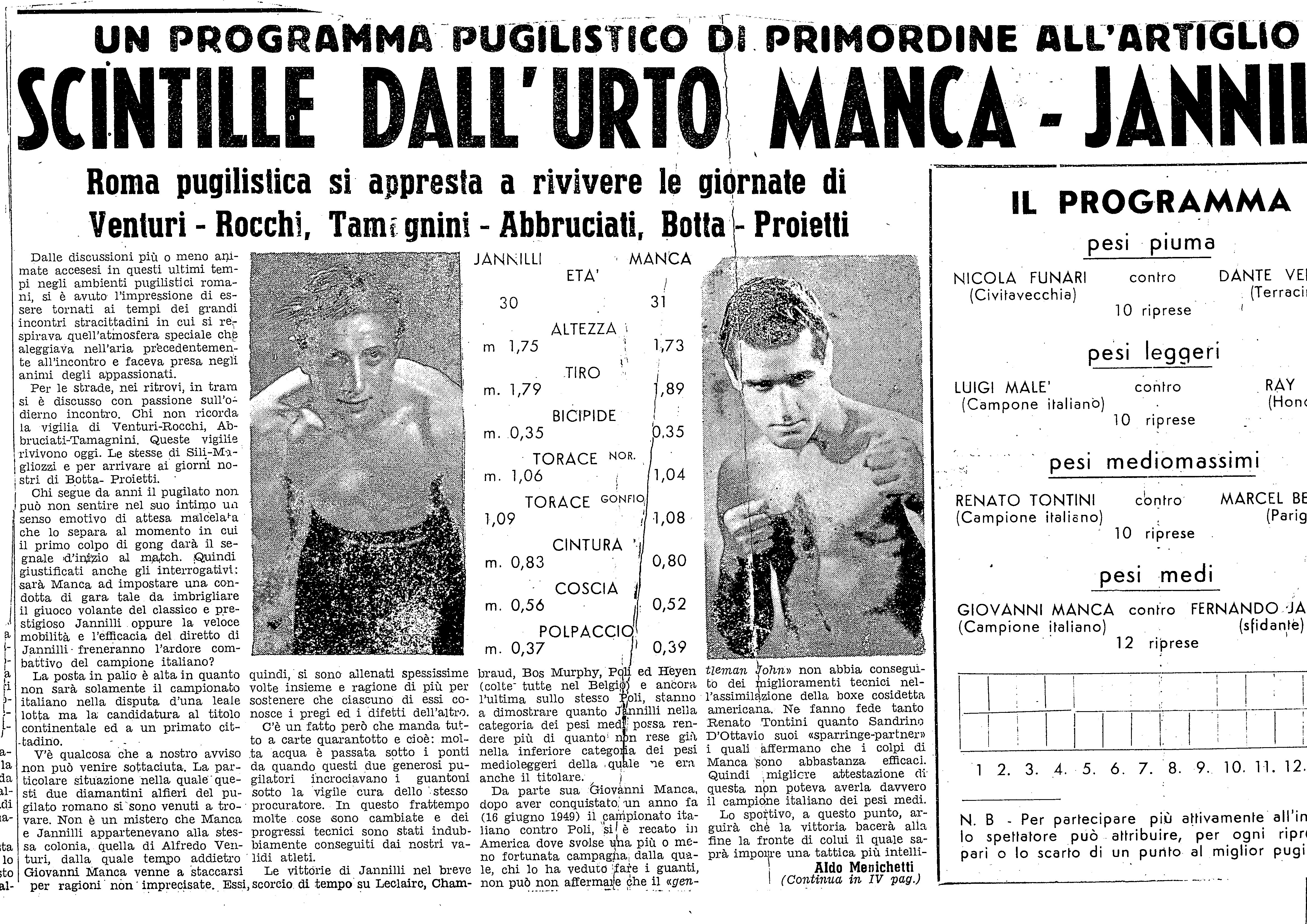 Jannilli vs Manca titolo italiano pesi medi roma 1950